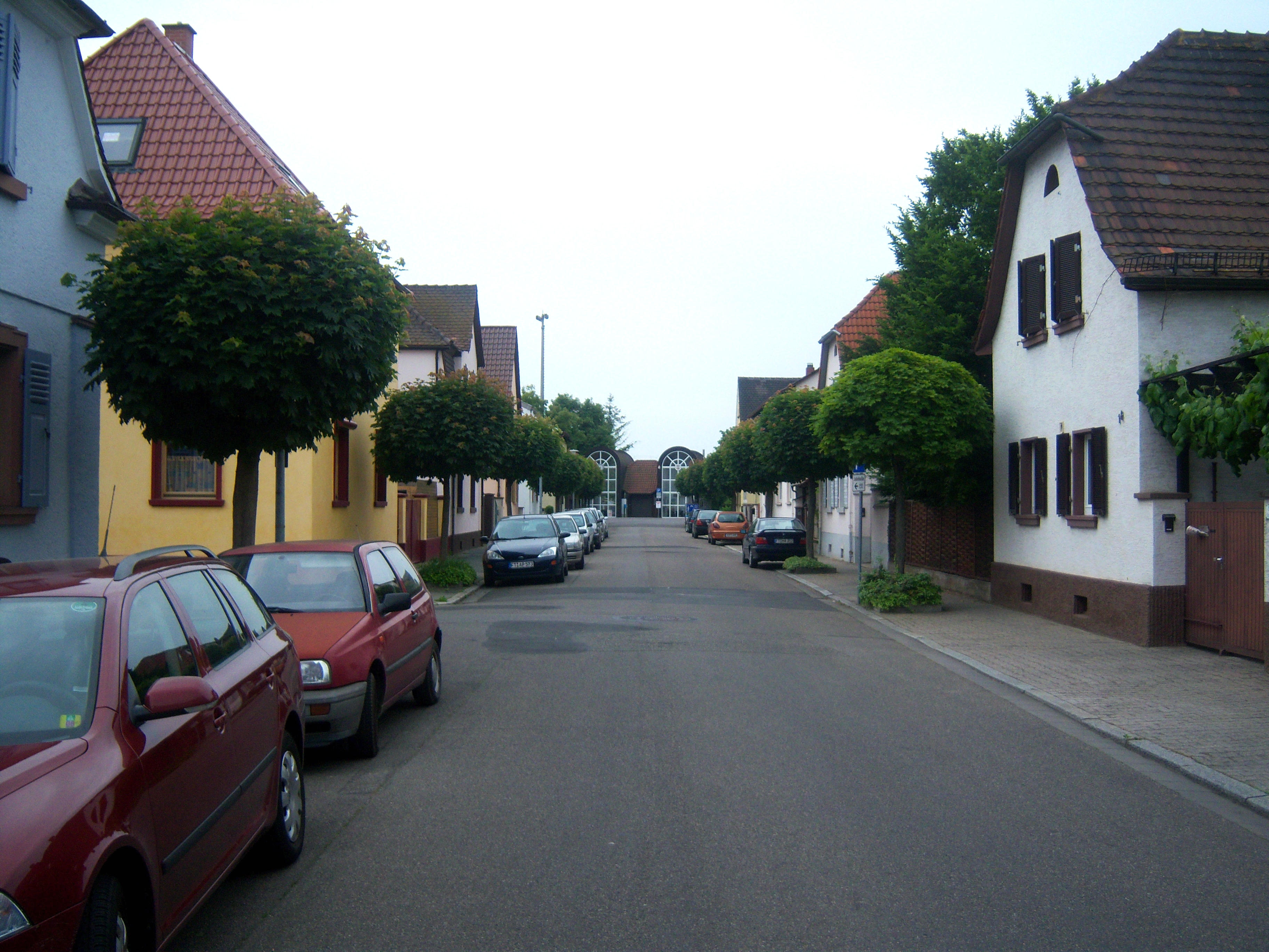 Die Bahnhofstraße in Bobenheim-Roxheim in der Pfalz in Rheinland-Pfalz (Deutschland)